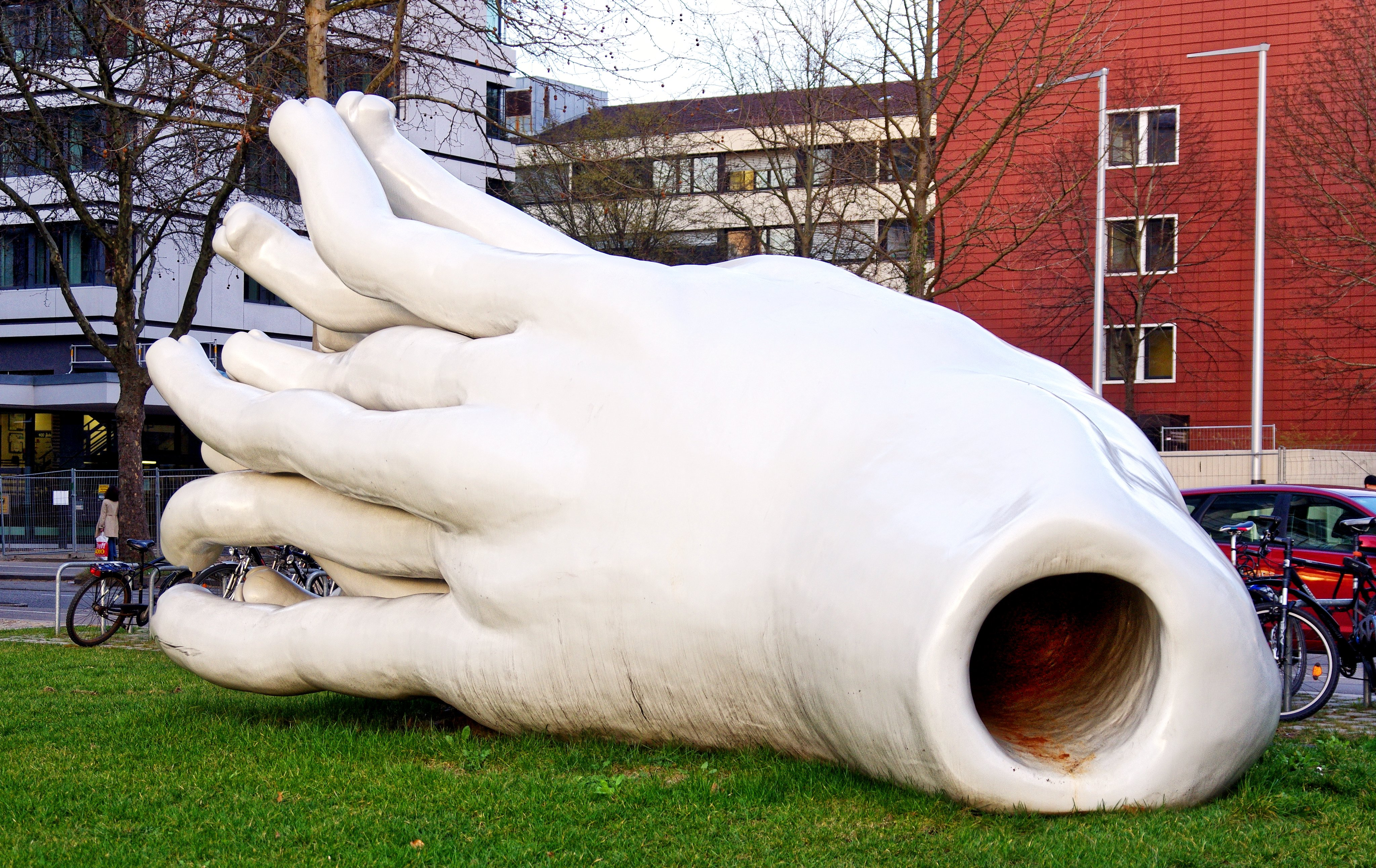 Plastik augenloses von Reiner Maria Matysik vor dem Institut für Biochemie und Molekularbiologie und Institut für Molekulare Medizin und Zellforschung